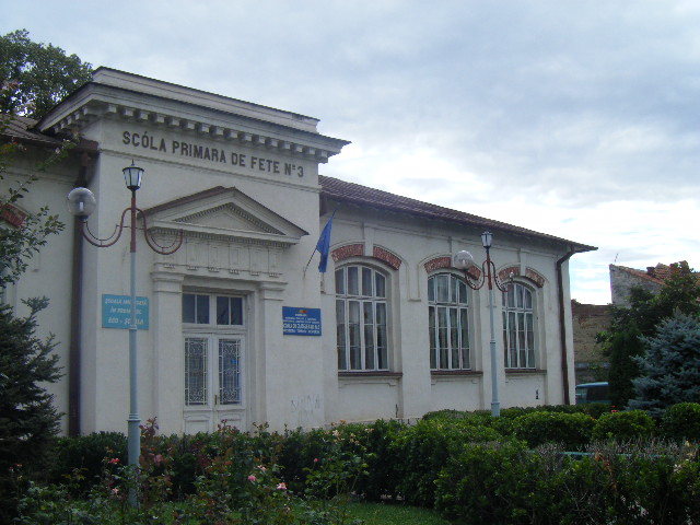 numita si Școala Generală nr.3